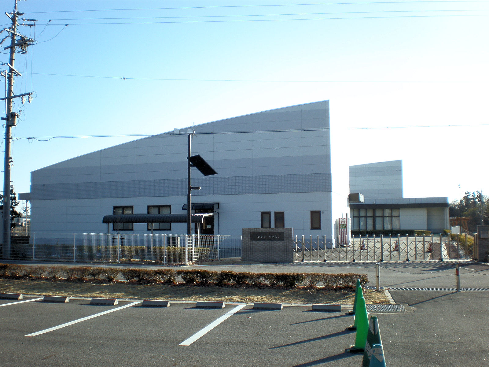 愛知県小牧市にあるリサイクル関連施設プラザハウス